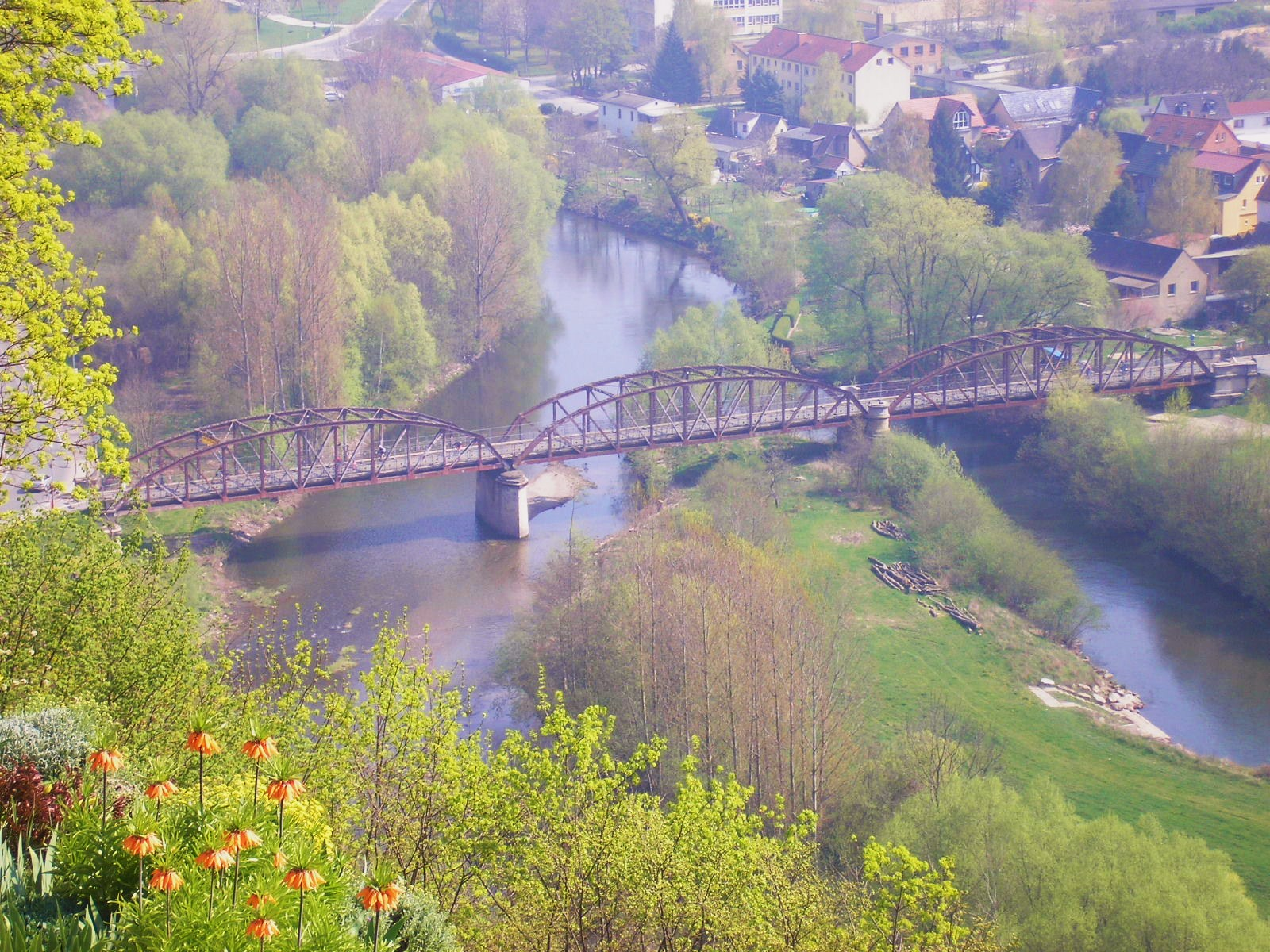 Die Saalebrücke in Dornburg/Saale (Thüringen).